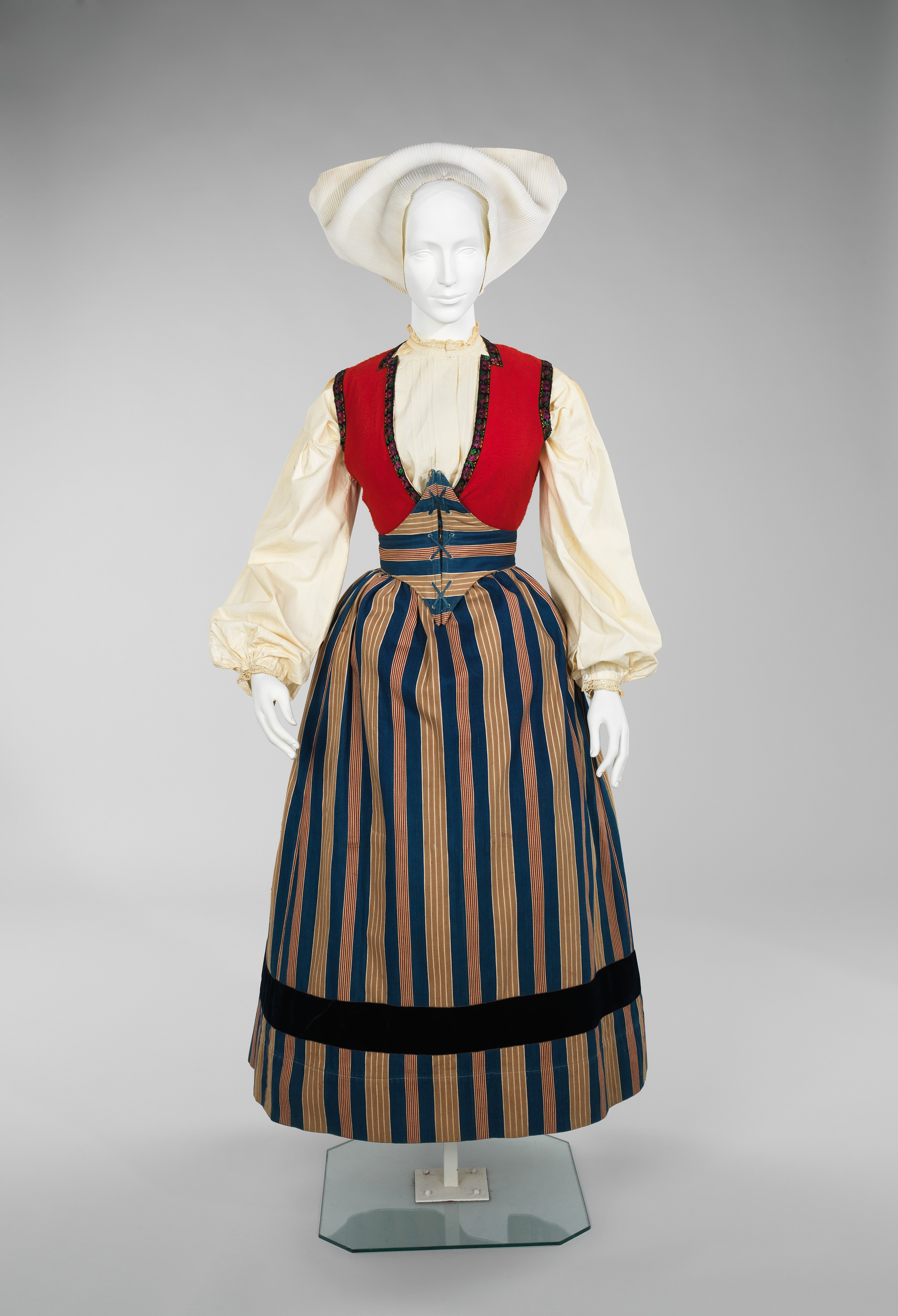 Norwegian; Ensemble